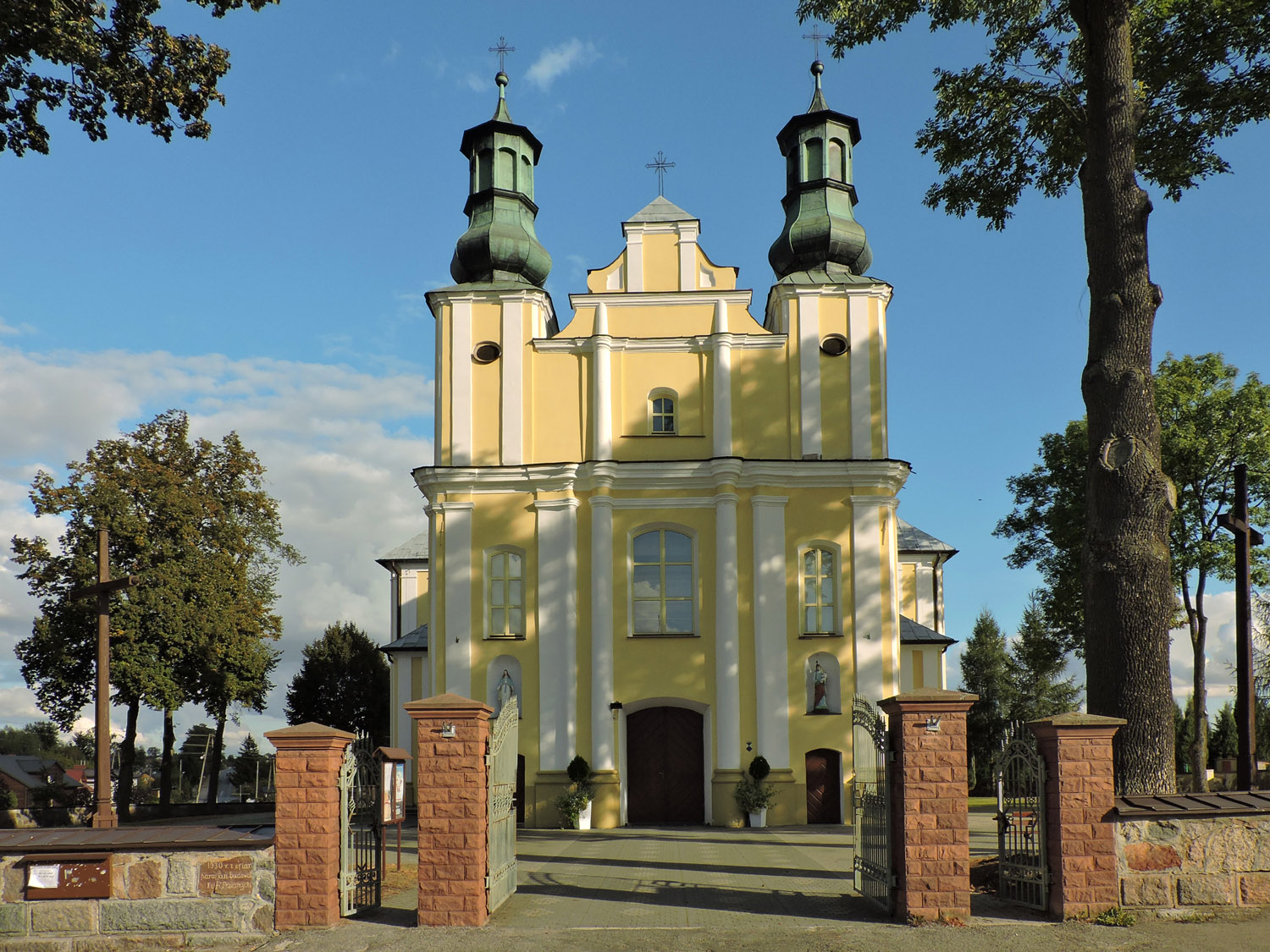 Górzno, kościół par. pw. św. Jana Chrzciciela, 1787, 1919-1920